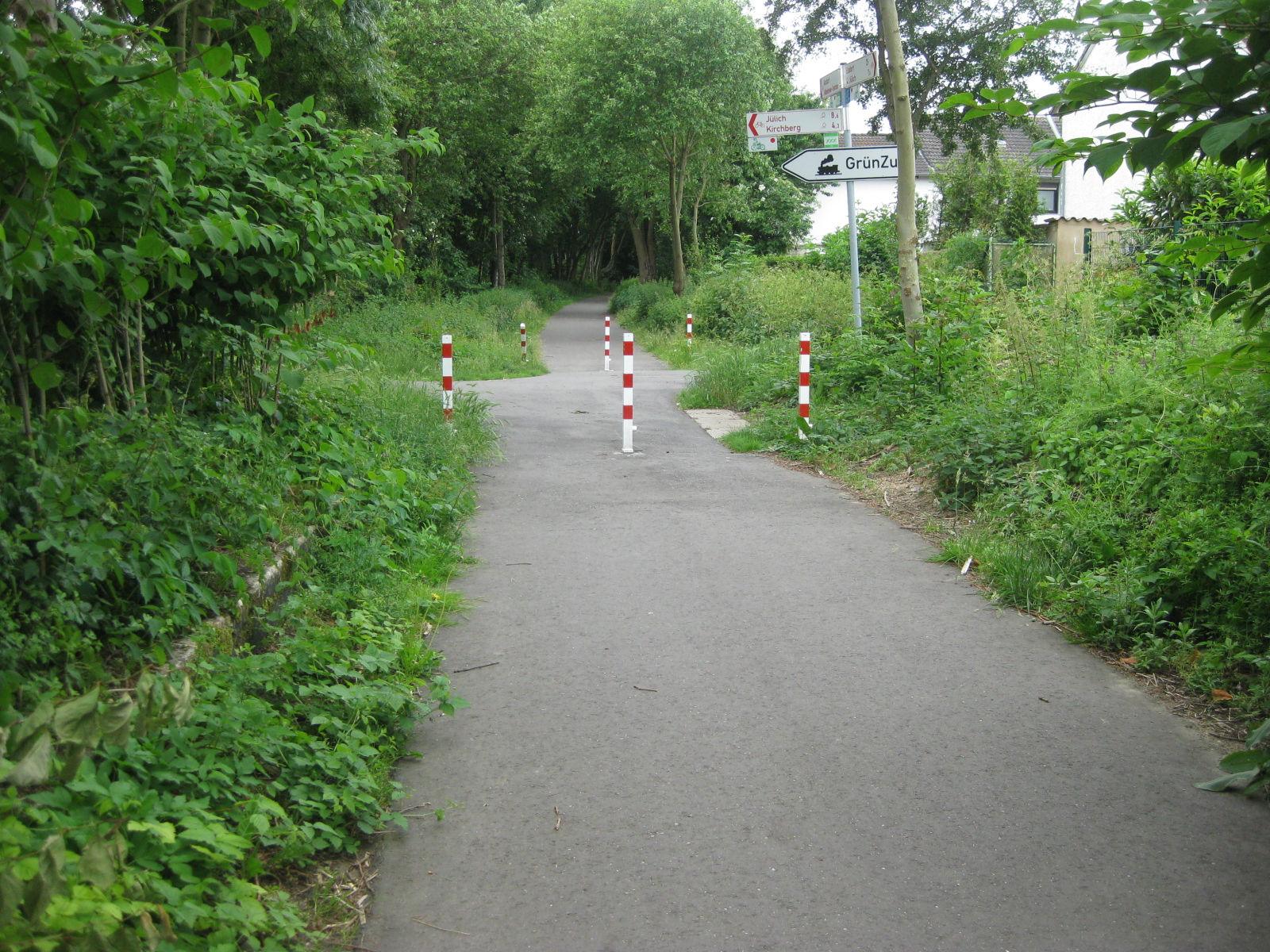 Reste des Bahnhofs Aldenhoven im Kreis Düren, Nordrhein-Westfalen